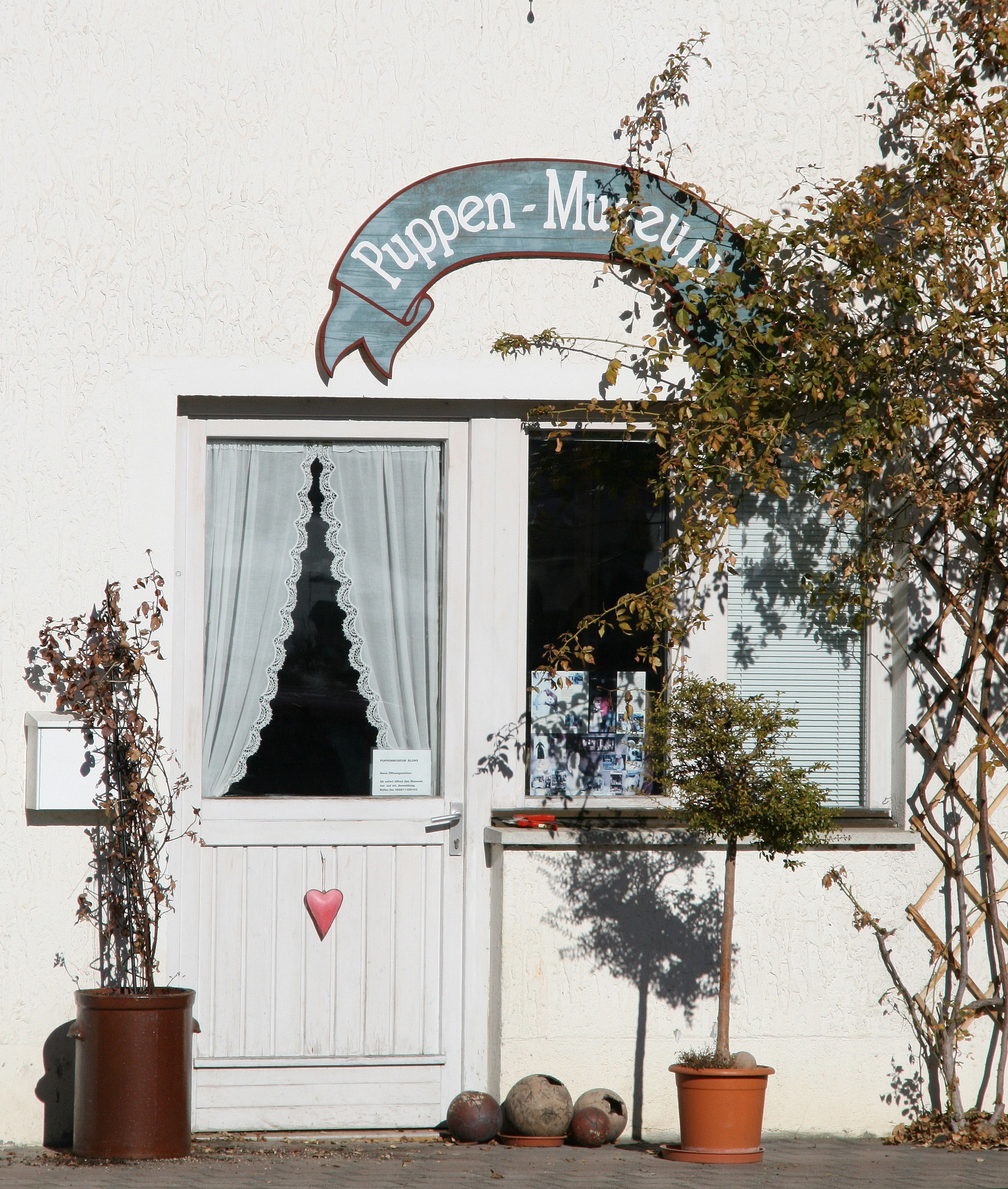 Puppenmuseum in Blons im grossen Walsertal, Vorarlberg.